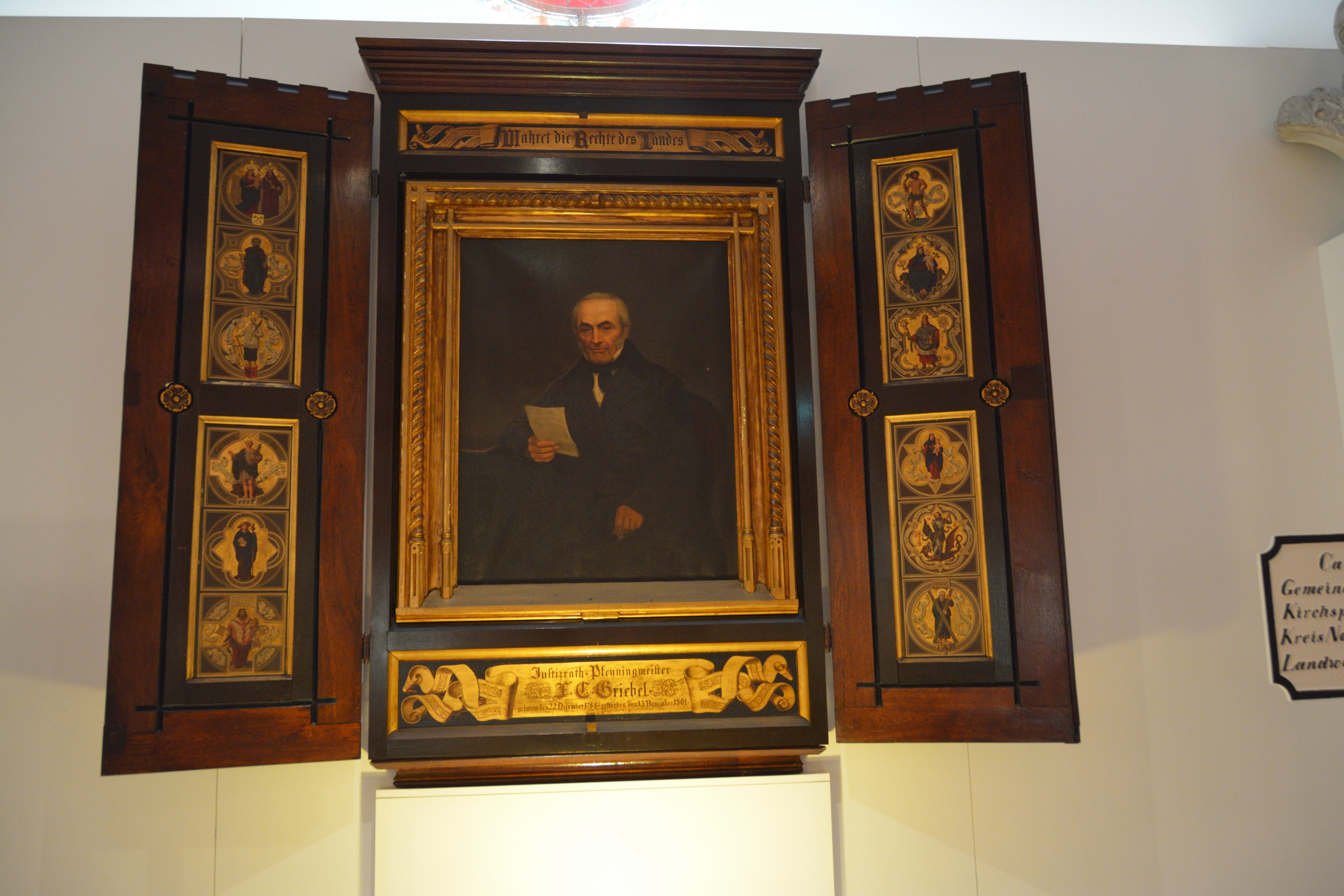 Impressionen aus dem Dithmarscher Landesmuseum